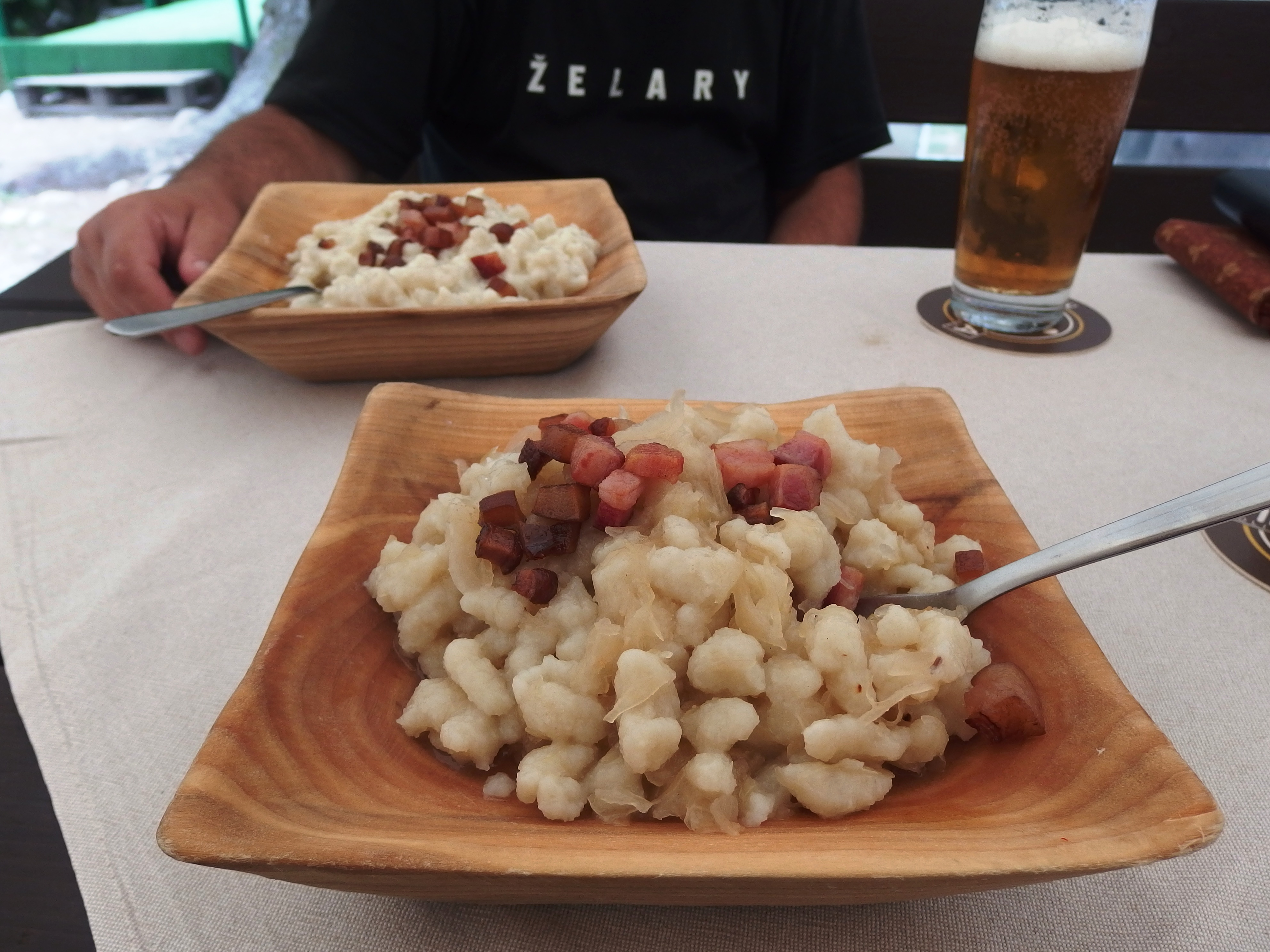 Vpředu strapačky se zelím, v pozadí brynzové halušky. Dem-anovská dolina, Slovensko.